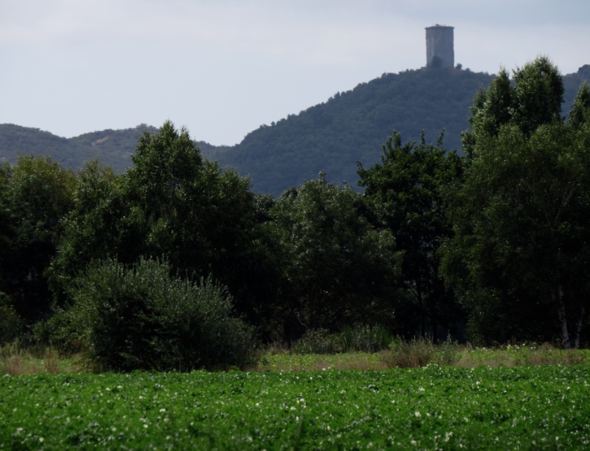 vista desde lejos